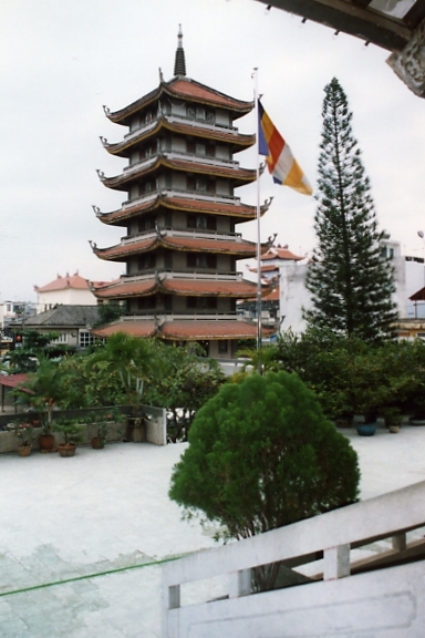 Tháp của chùa Vĩnh Nghiêm, Thành phố Hồ Chí Minh, 2005. Hình này do Phan Ba tự chụp vào tháng 11 năm 2005 và đưa vào phạm vi công cộng.